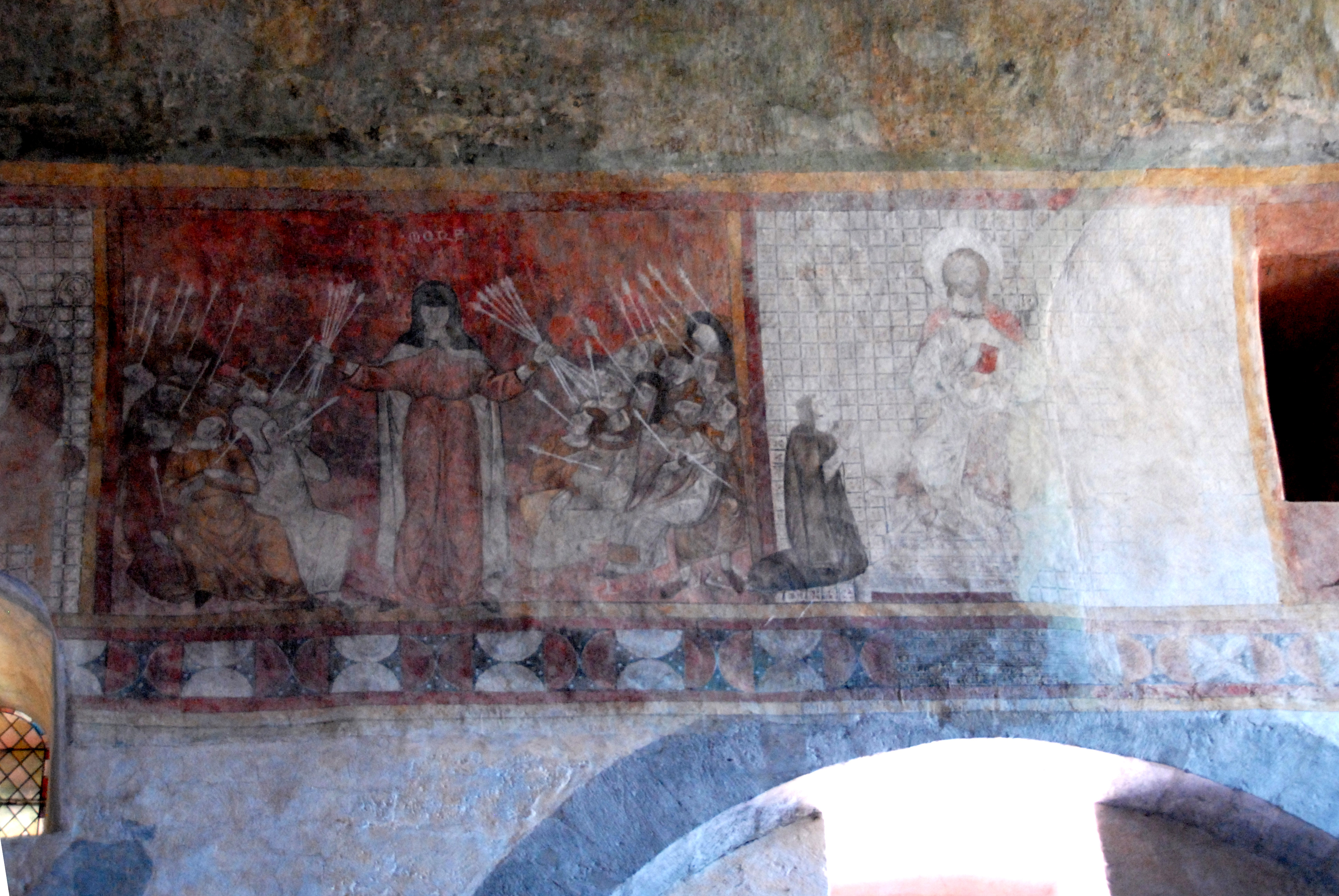 Kirche St.-André Lavaudieu, Südwand, Freskoband, Die schwarze Pest + Christus segnet Nonne